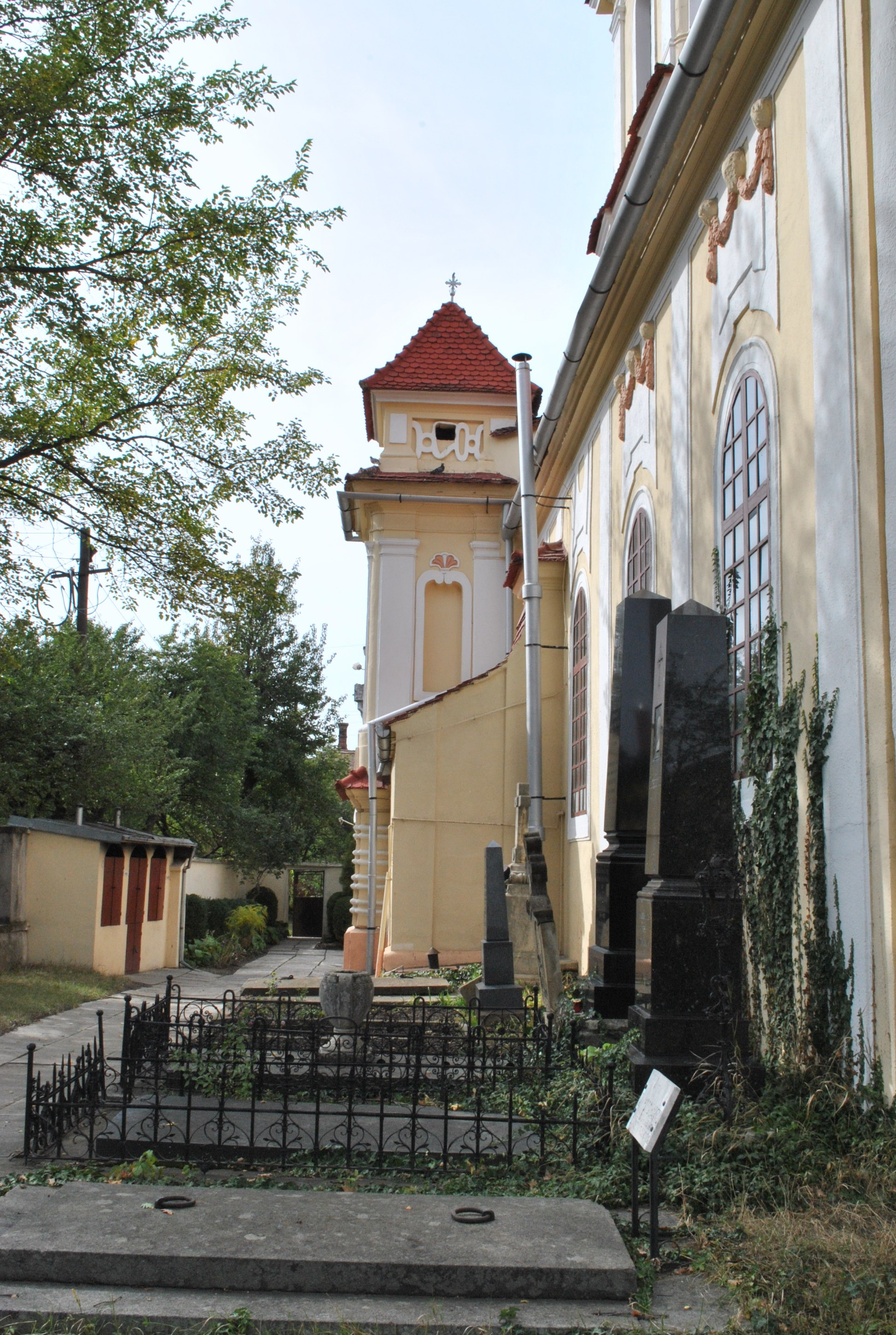 Cimitirul bisericii "Sf. Apostoli Petru și Pavel" sec. XVIII - XX 02